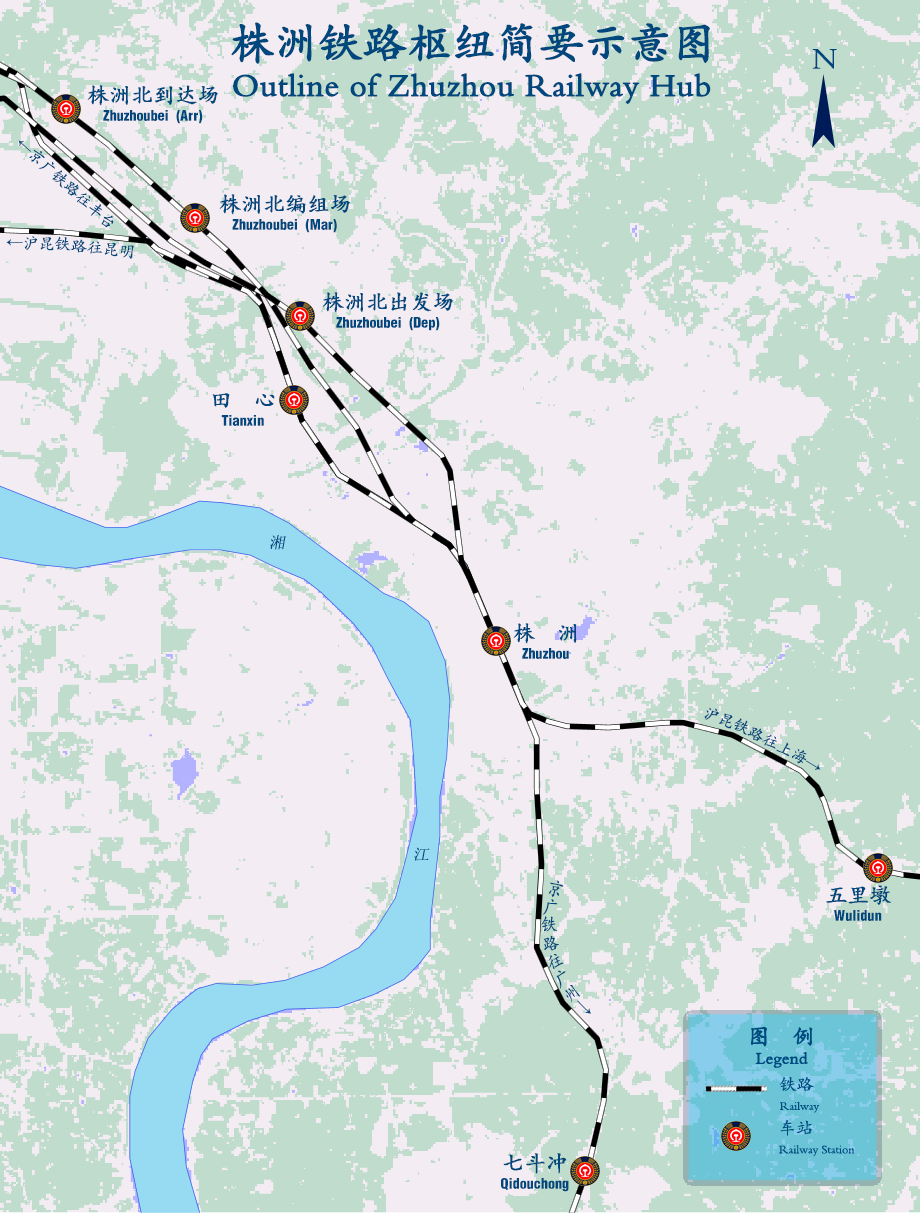 株洲铁路枢纽简图（田心-株北-株洲-五里墩-七斗冲）